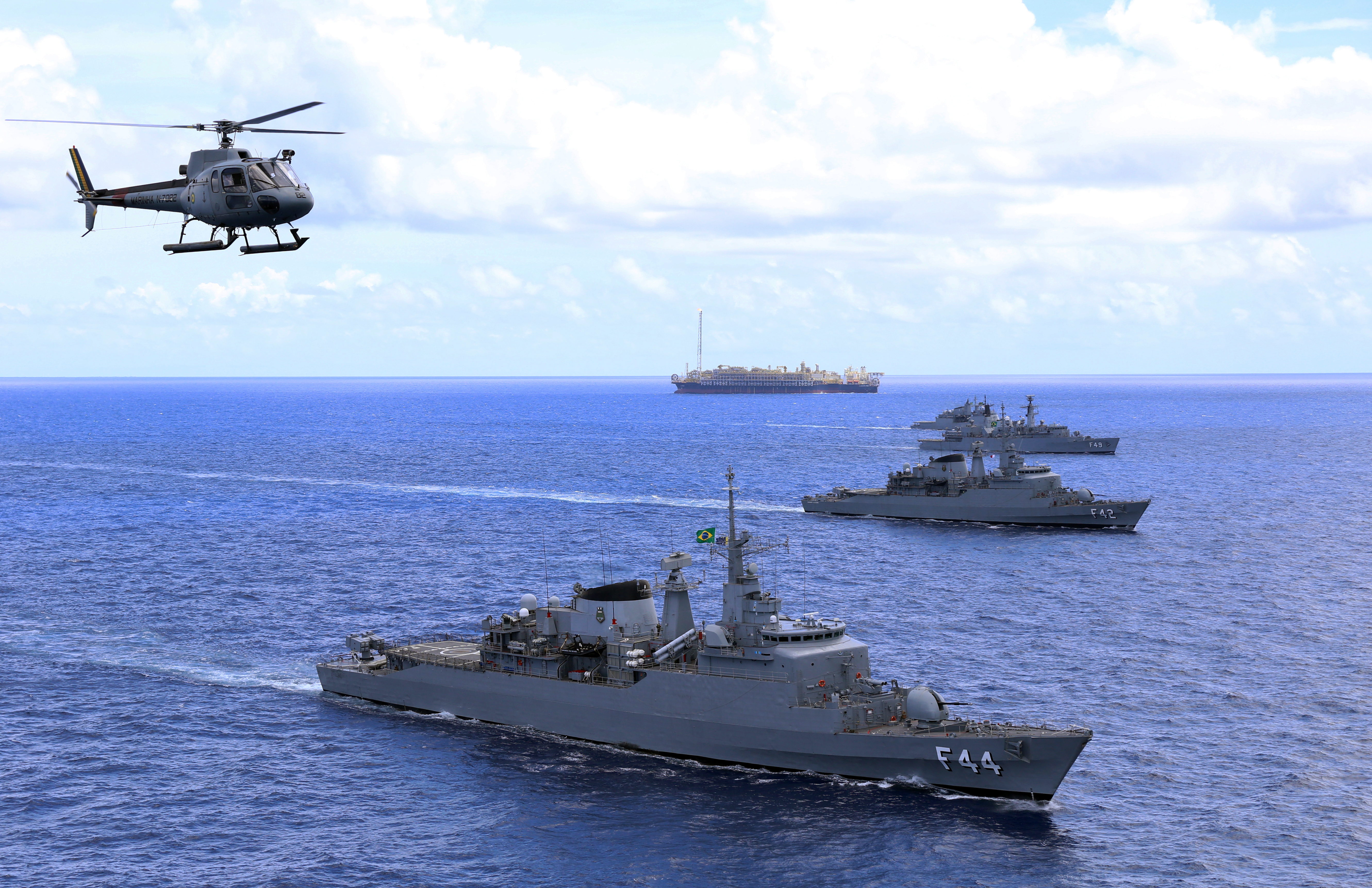 Arquivo liberado pela Marinha do Brasil através de projeto GLAM com Wiki Educação Brasil